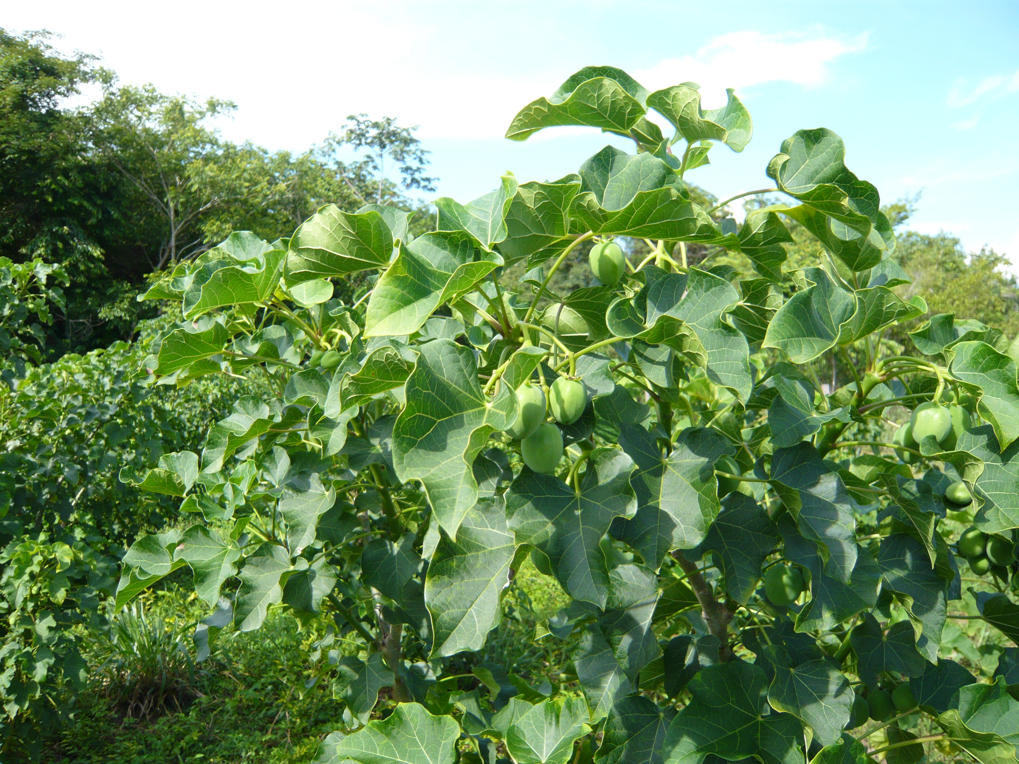 Planta de Jatropha curcas de un año de edad